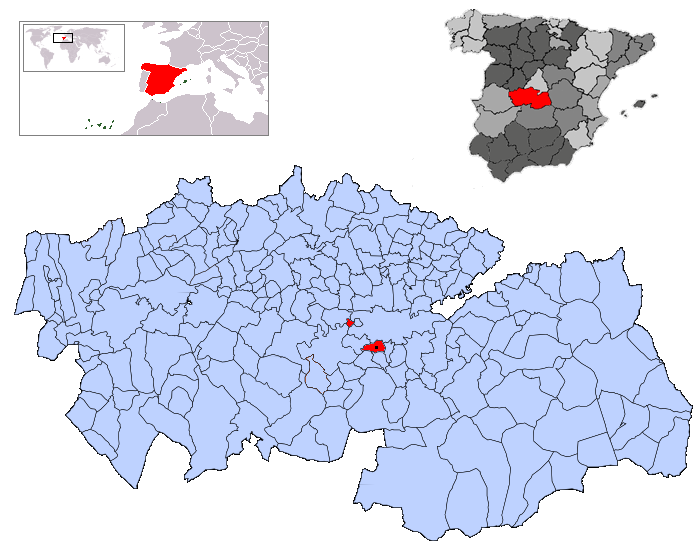 Argés en la provincia de Toledo